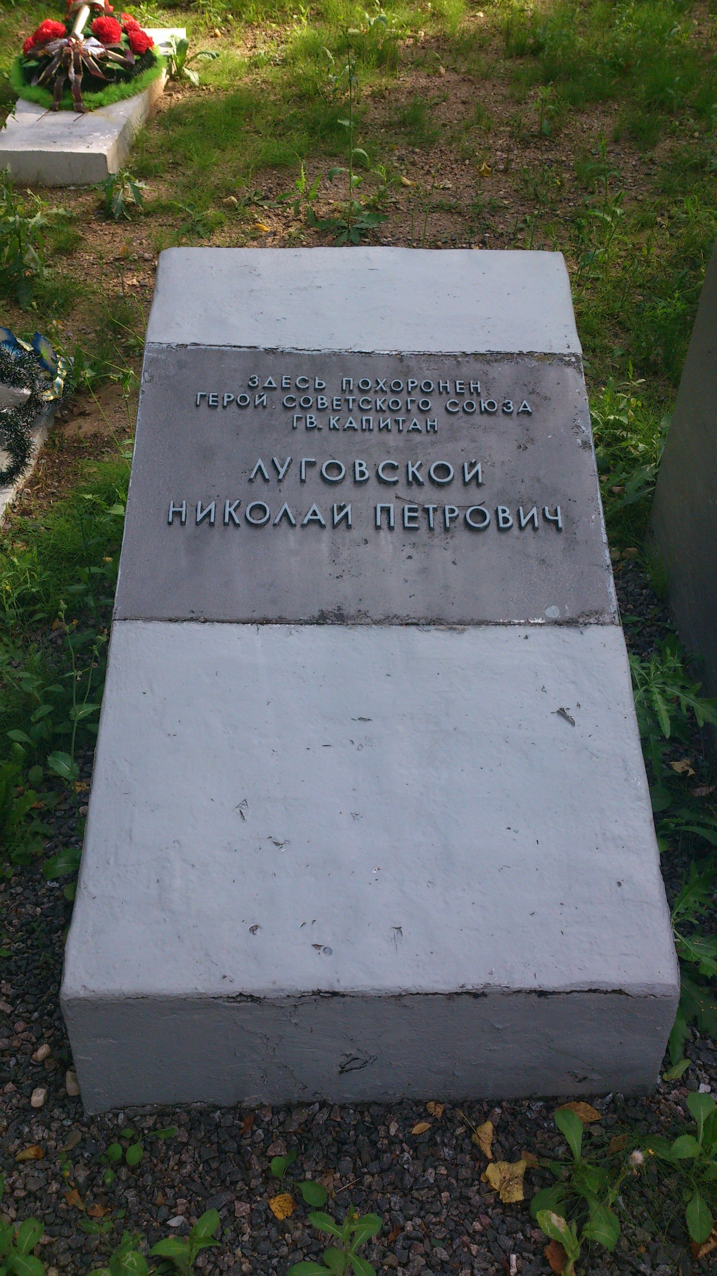 Надмогильная плита Герою Советского Союза Луговскому Н.П. на братской могиле в Бешенковичах